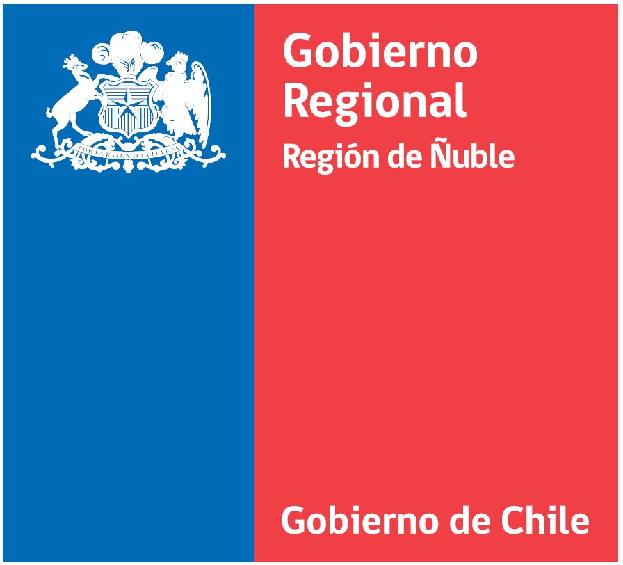 Logo del Gobierno Regional de Ñuble